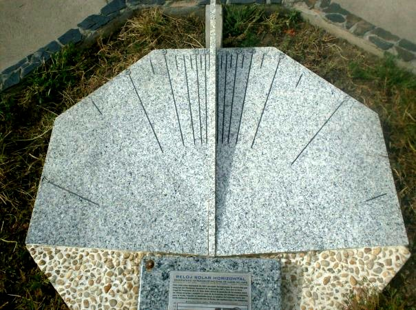 Reloj Solar en las instalaciones del Observatorio Astronómico Nacional de Llano del Hato, Merida - Venezuela